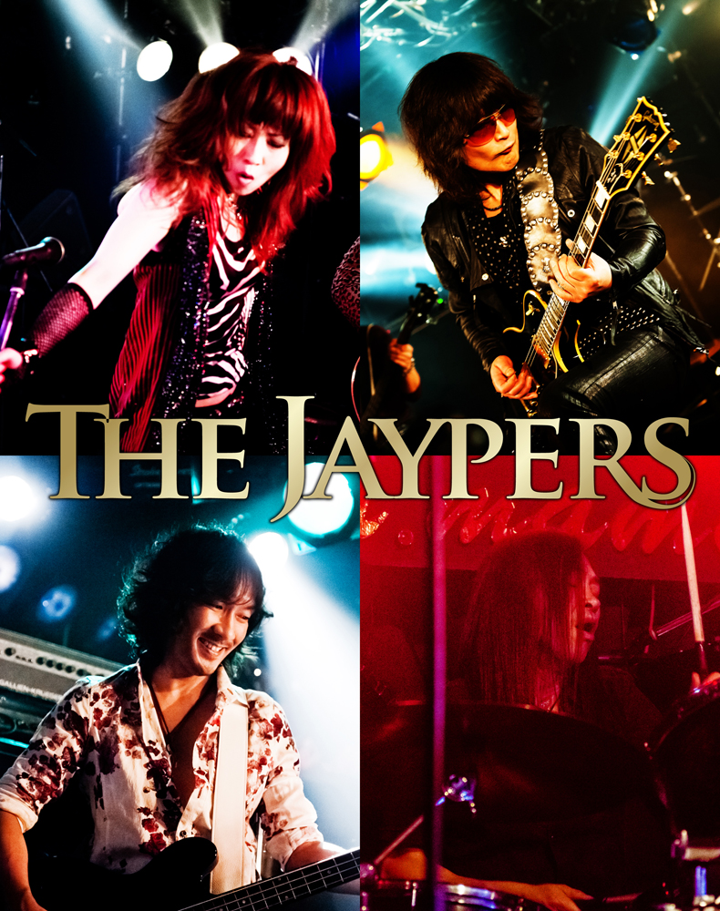 メンバー写真